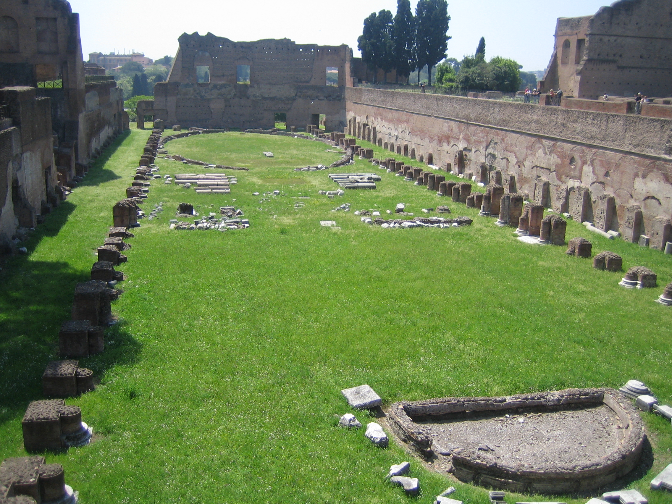 Blick auf das Privat-Stadion des Palastes auf dem Palatin-Hügel in Rom